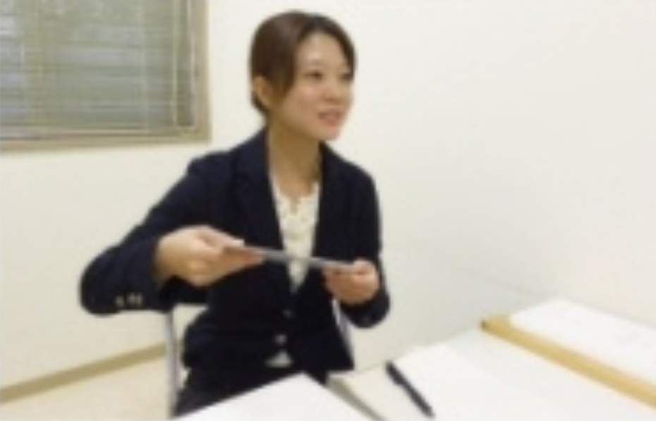 少年鑑別所での心理検査